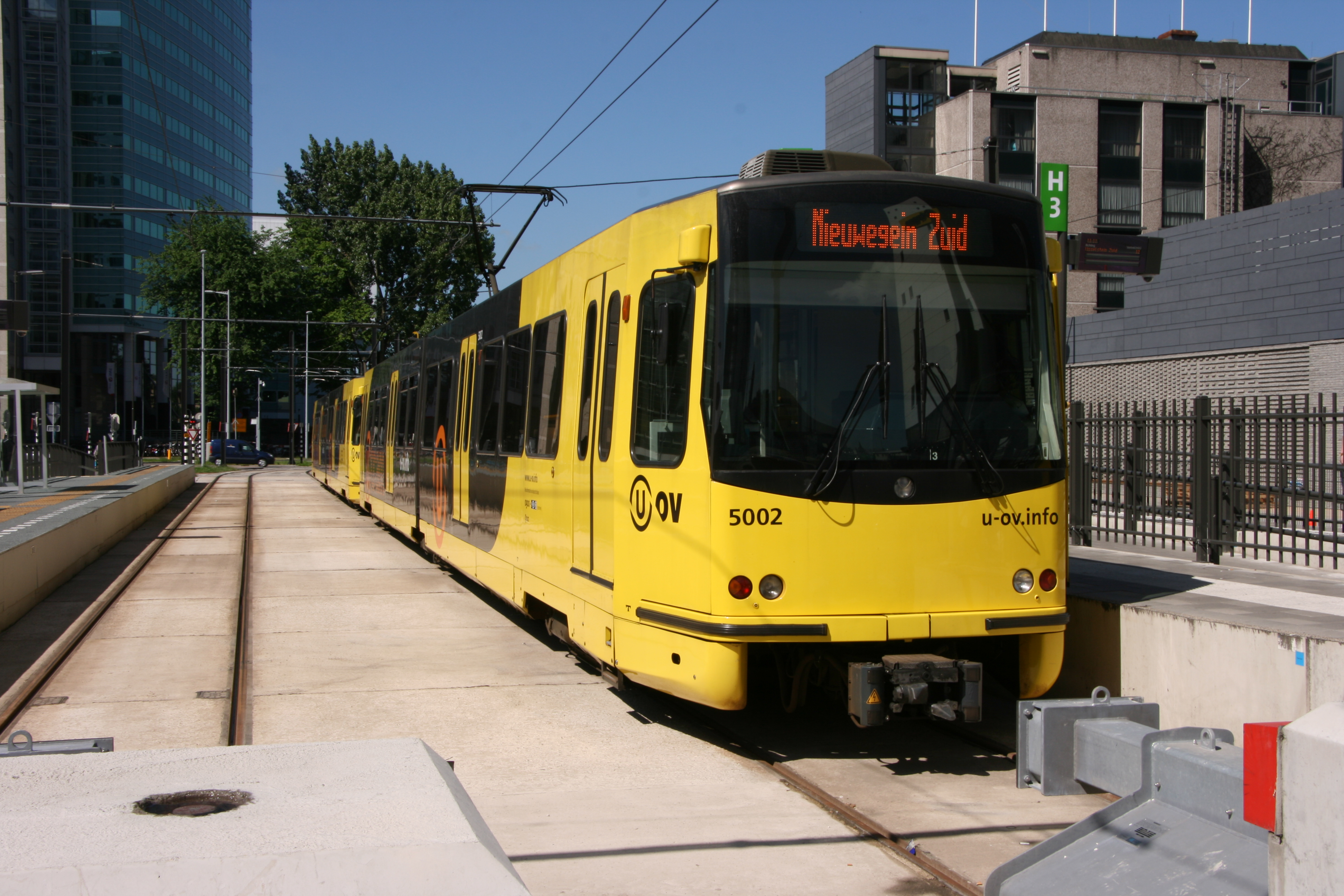 Utrecht Centraal Station, Jaarbeurszijde. 11 juni 2014, 11:10. Bouwjaar 1983. Revisie 2000.